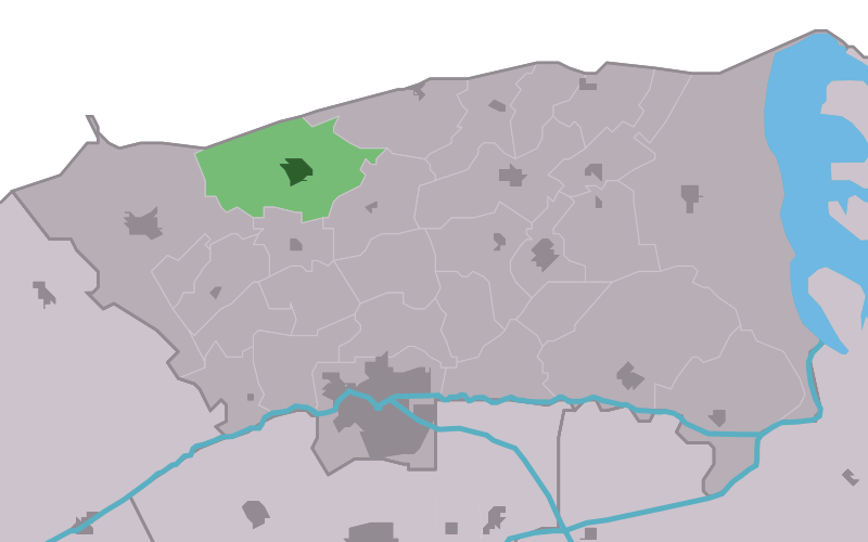 Kaartsje fan himrik fan Ternaard